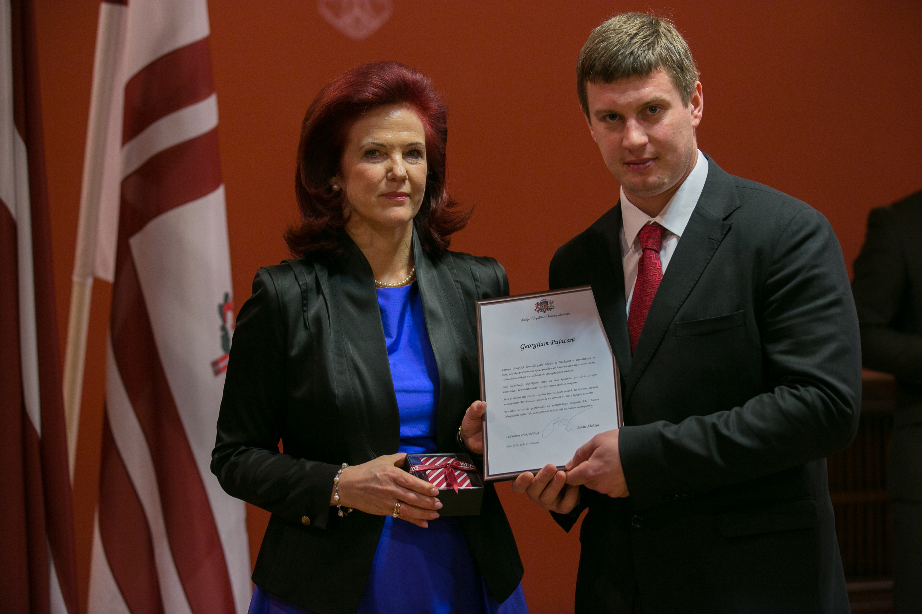 2014.gada 27.februāris. Saeimas priekšsēdētāja Solvita Āboltiņa tiekas ar Latvijas olimpisko komandu XXII Ziemas olimpiskajās spēlēs Sočos. Foto: Ernests Dinka, Saeimas Kanceleja Izmantošanas noteikumi: saeima.lv/lv/autortiesibas Solvita Āboltiņa tiekas ar Latvijas olimpisko komandu XXII Ziemas olimpiskajās spēlēs Sočos.